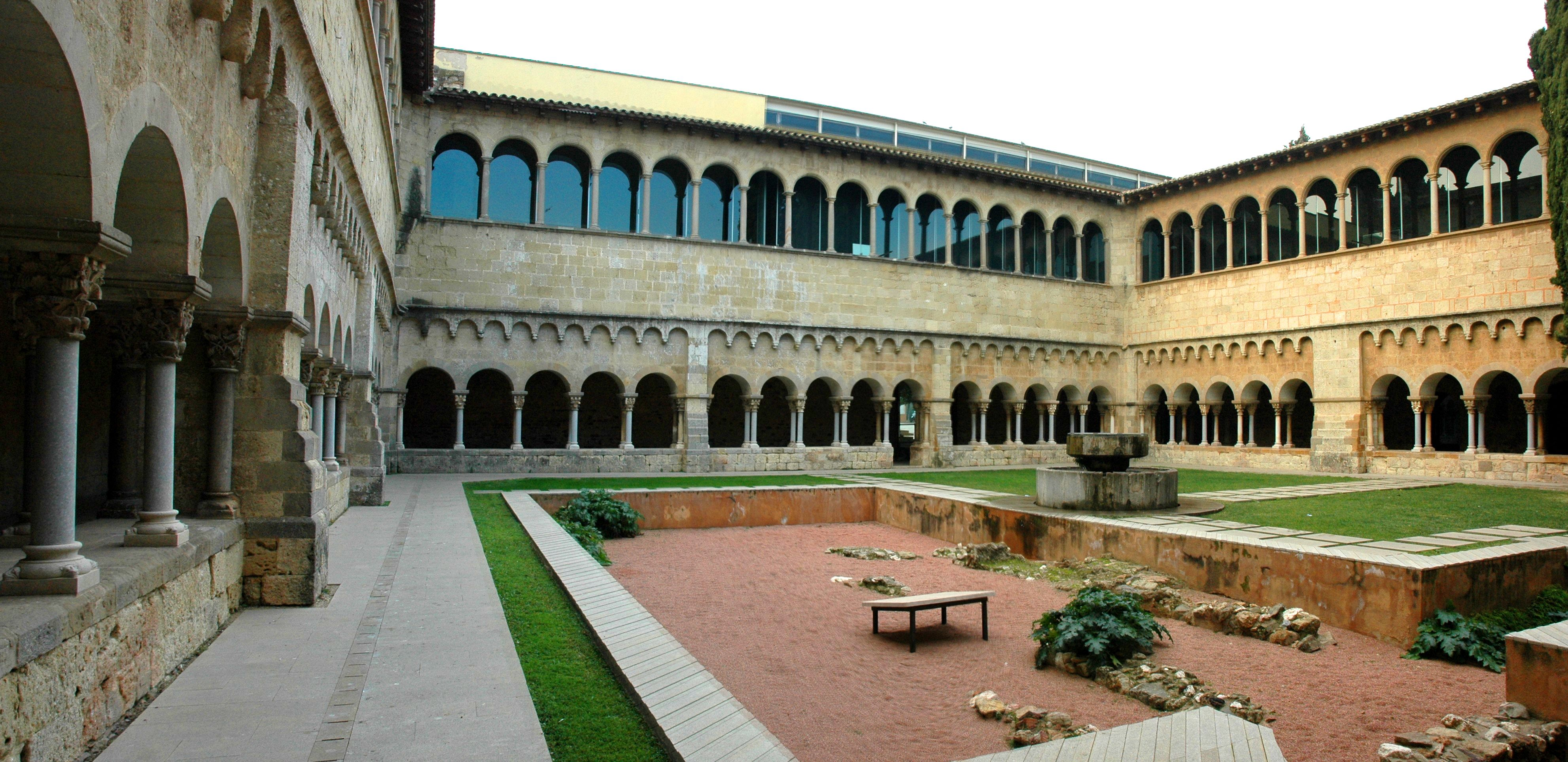 Monestir de Sant Cugat - Claustre angle sud-est pati